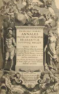 Titelblad ANNALES DUCUM SEU PRINCIPUM BRABANTIAE TOTIUSQUE BELGII, FRANCISCUS HARAEUS